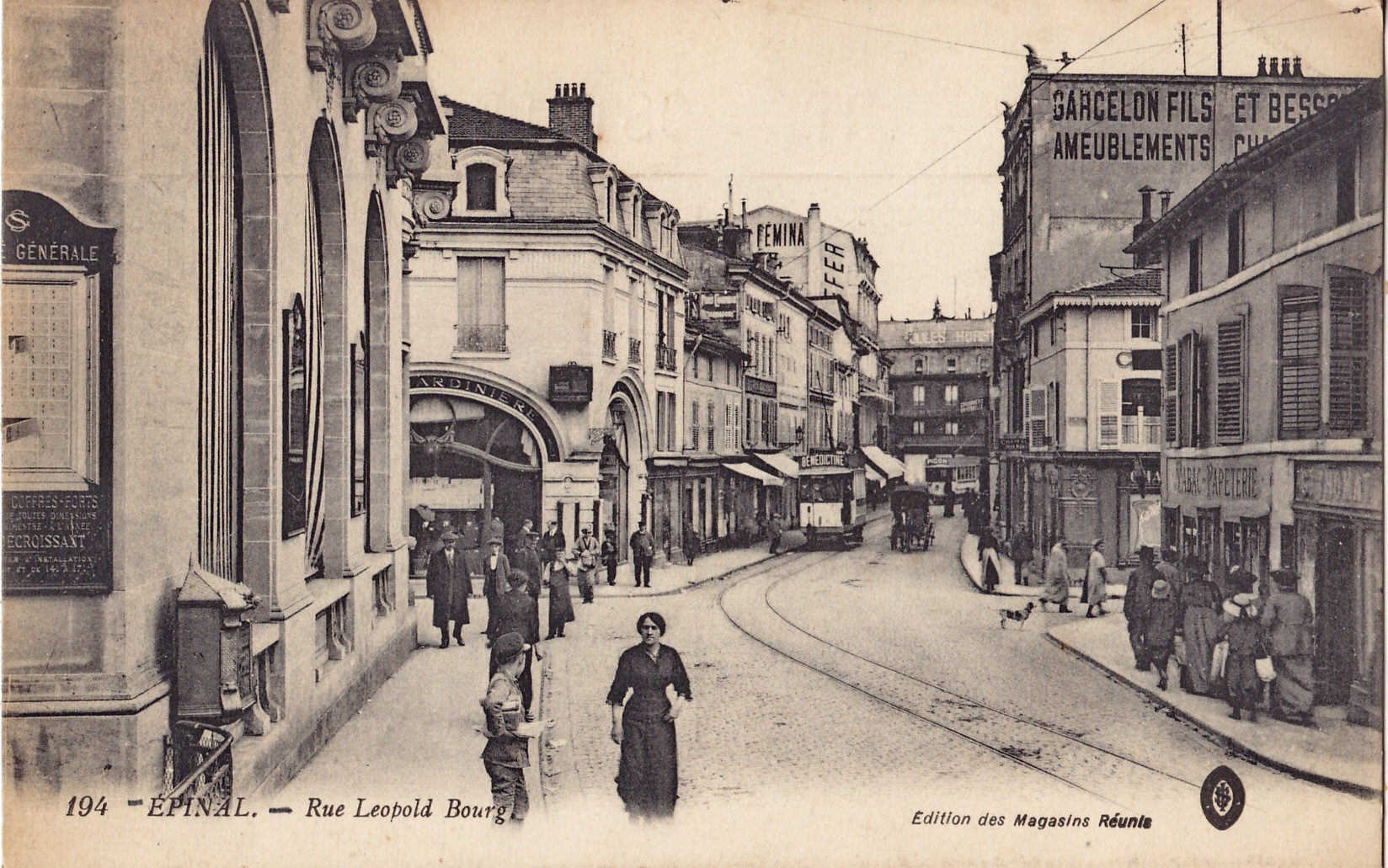 Carte postale ancienne éditée par les Magasins réunis, n°194 : Épinal - - Rue Léopold Bourg